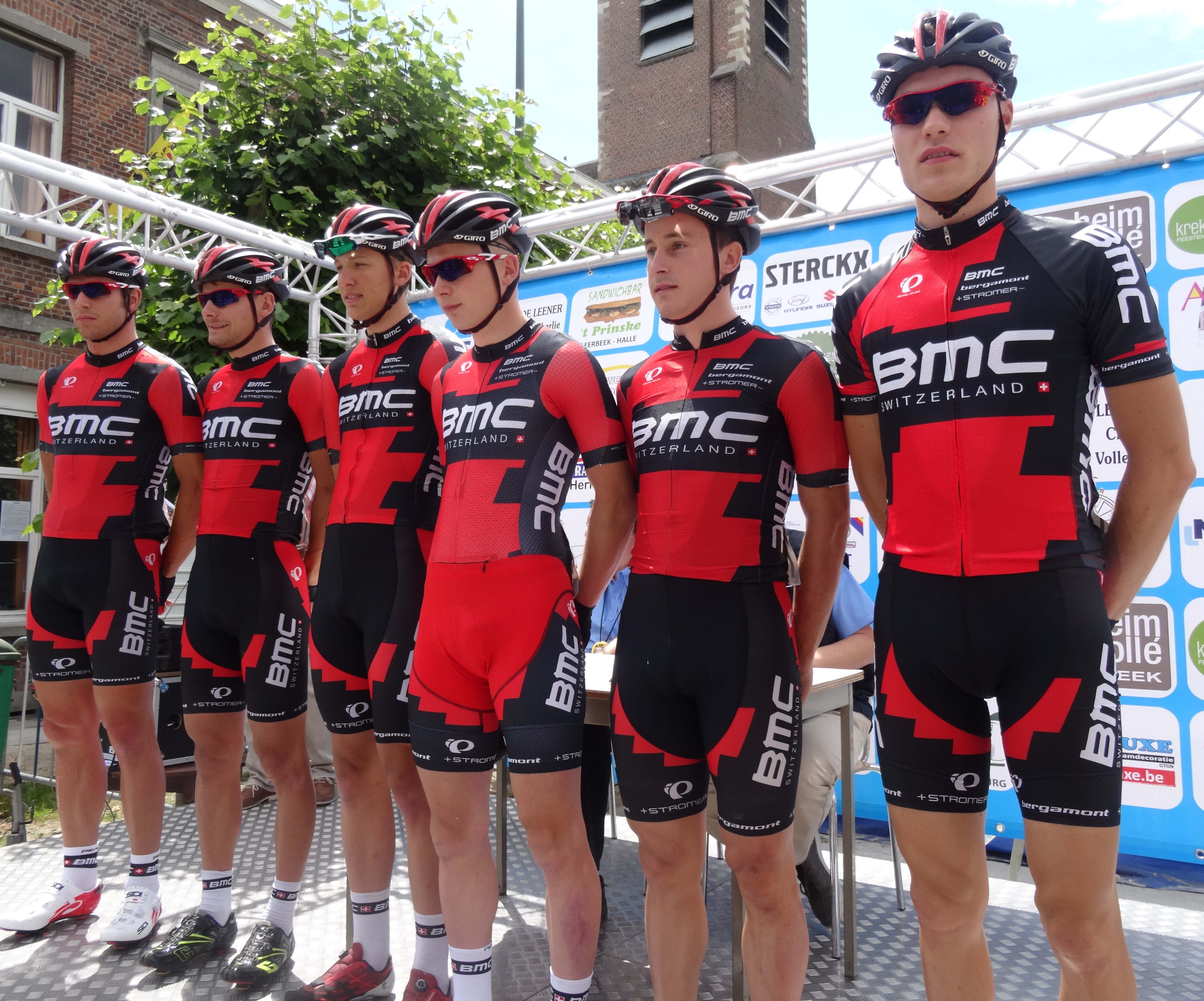 Reportage photographique réalisé le mercredi 25 juin à l'occasion du départ et de l'arrivée de l'Internationale Wielertrofee Jong Maar Moedig 2014 à Oetingen (Gooik), Belgique.